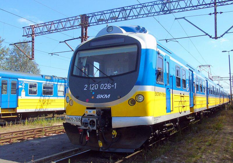 Zmodernizowany elektryczny zespół trakcyjny EN57AKM-768 należący do SKM Trójmiasto stoi na terenie stacji Gdynia Cisowa Postojowa.